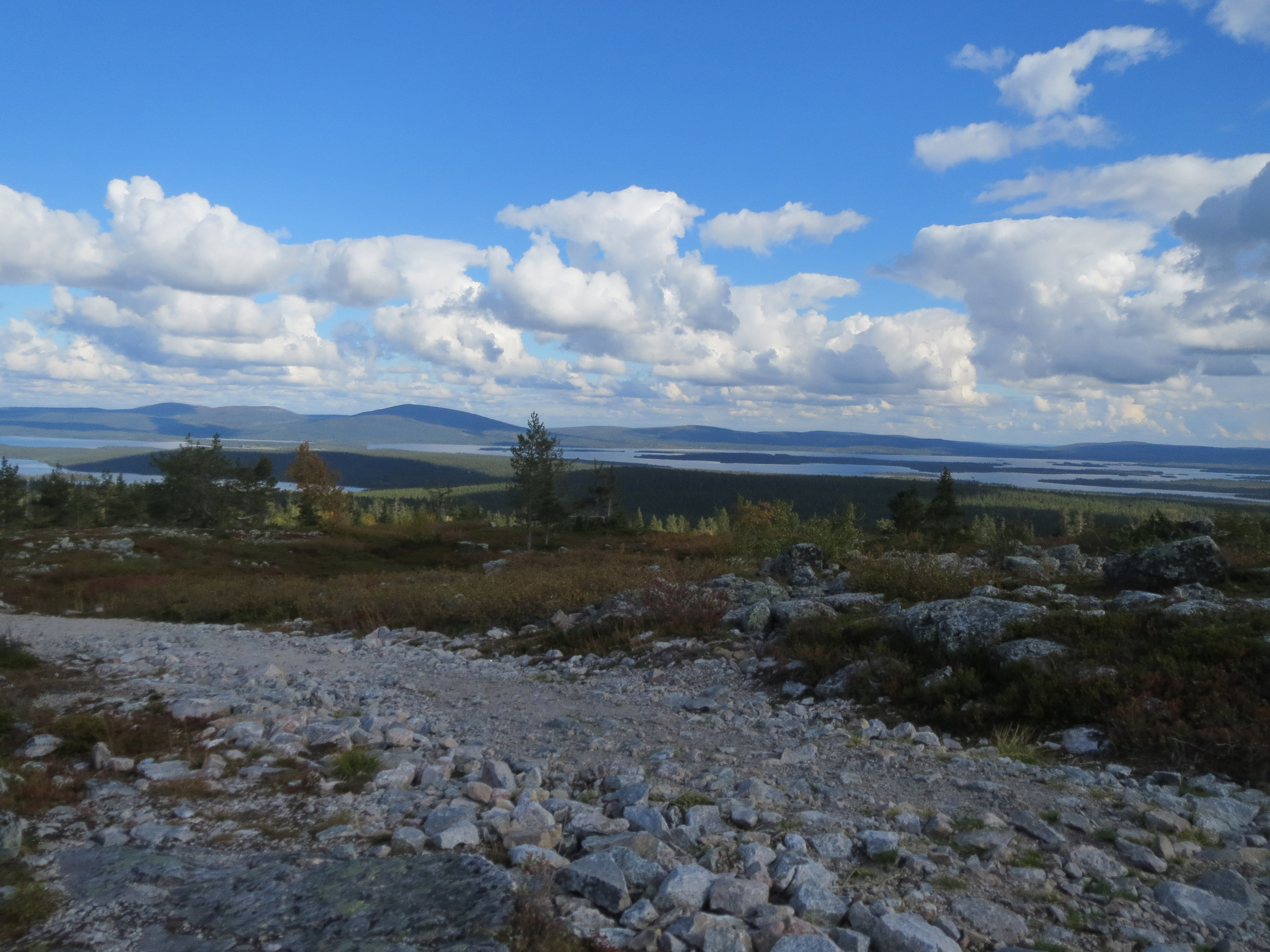 Näkymä Särkitunturilta Jerisjärvelle